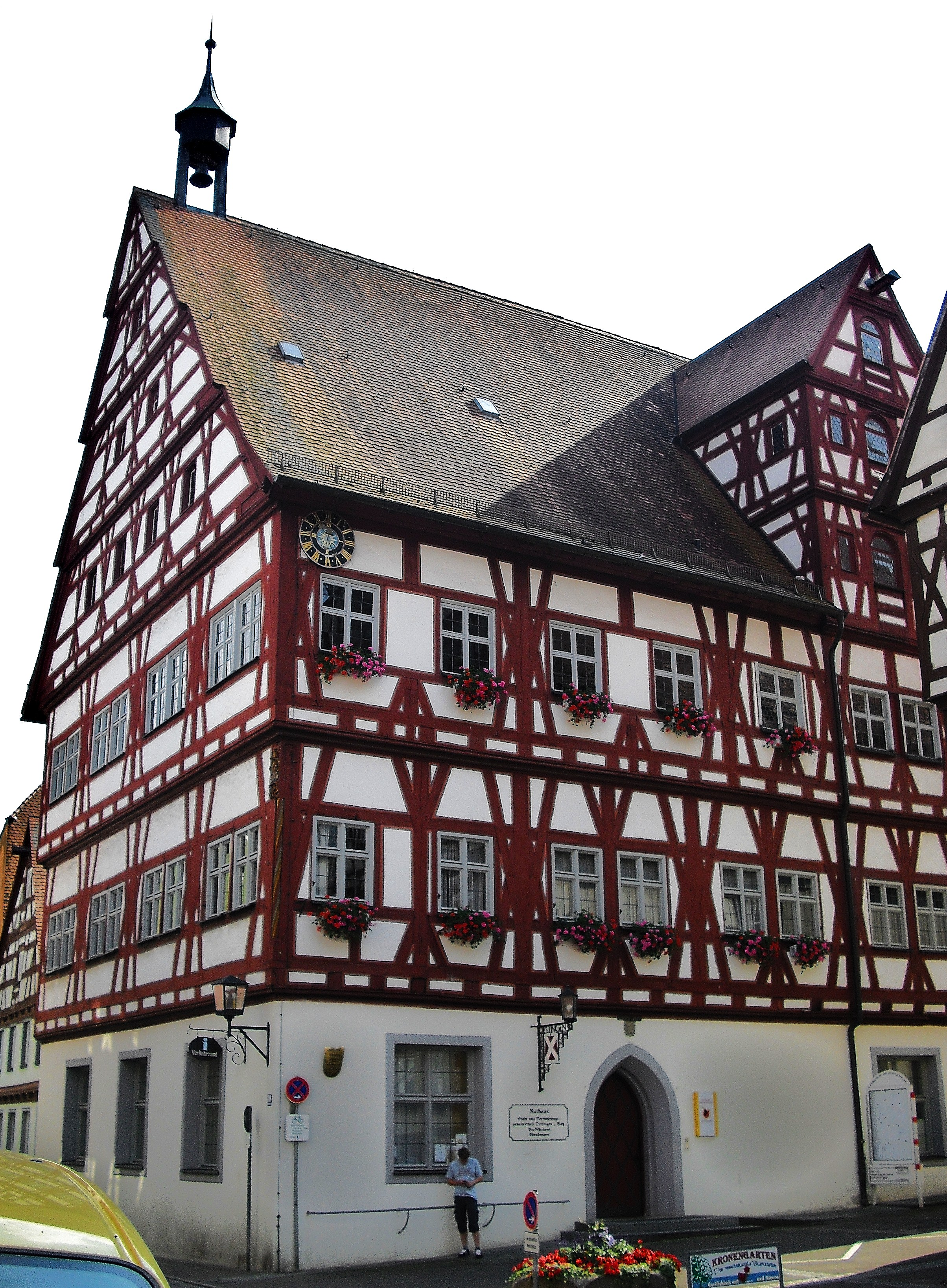 Rathaus Öttingen in Bayern